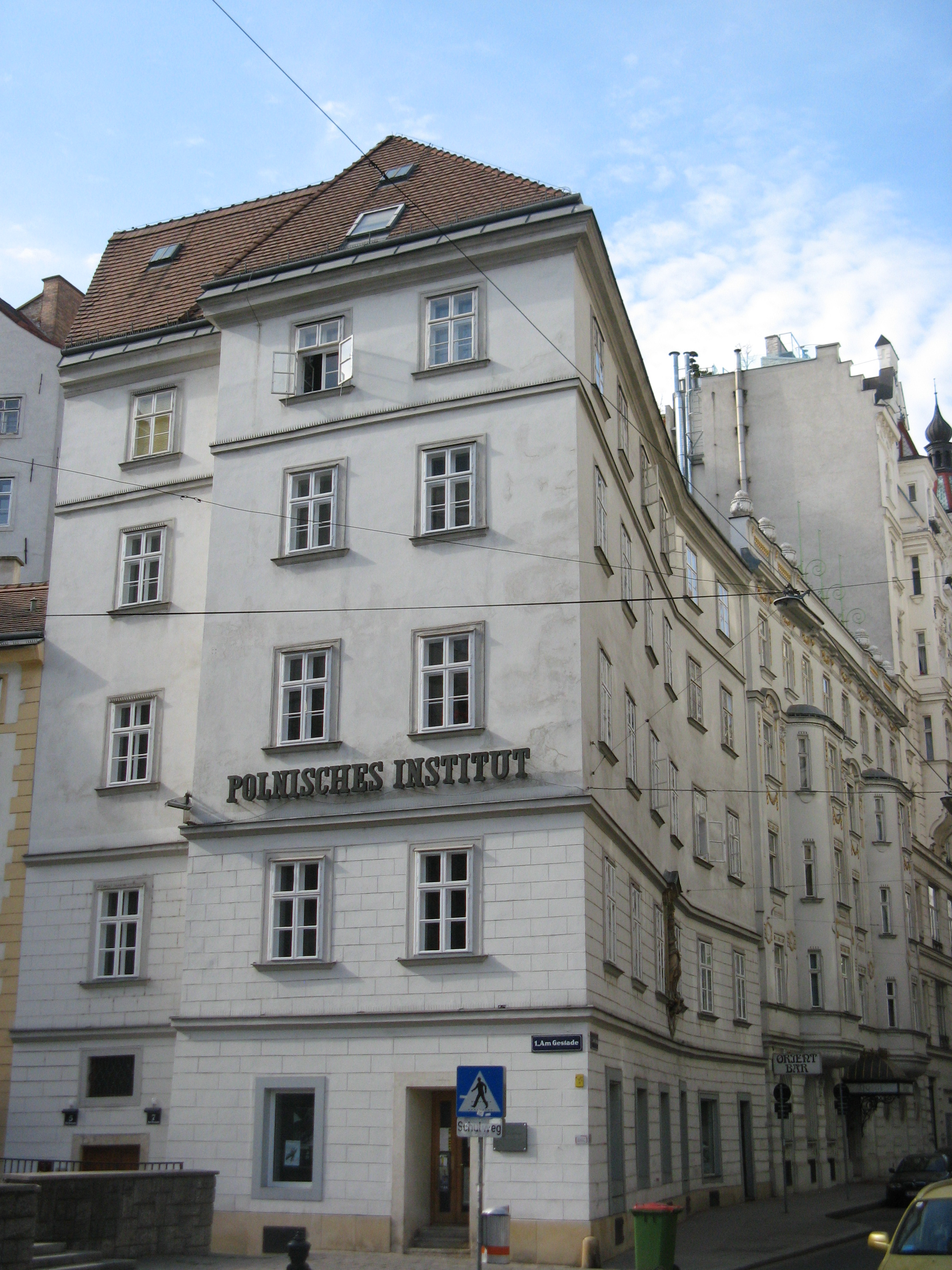 Bürgerhaus (im Kern frühneuzeitlich), Am Gestade 7, Wien-Innere Stadt